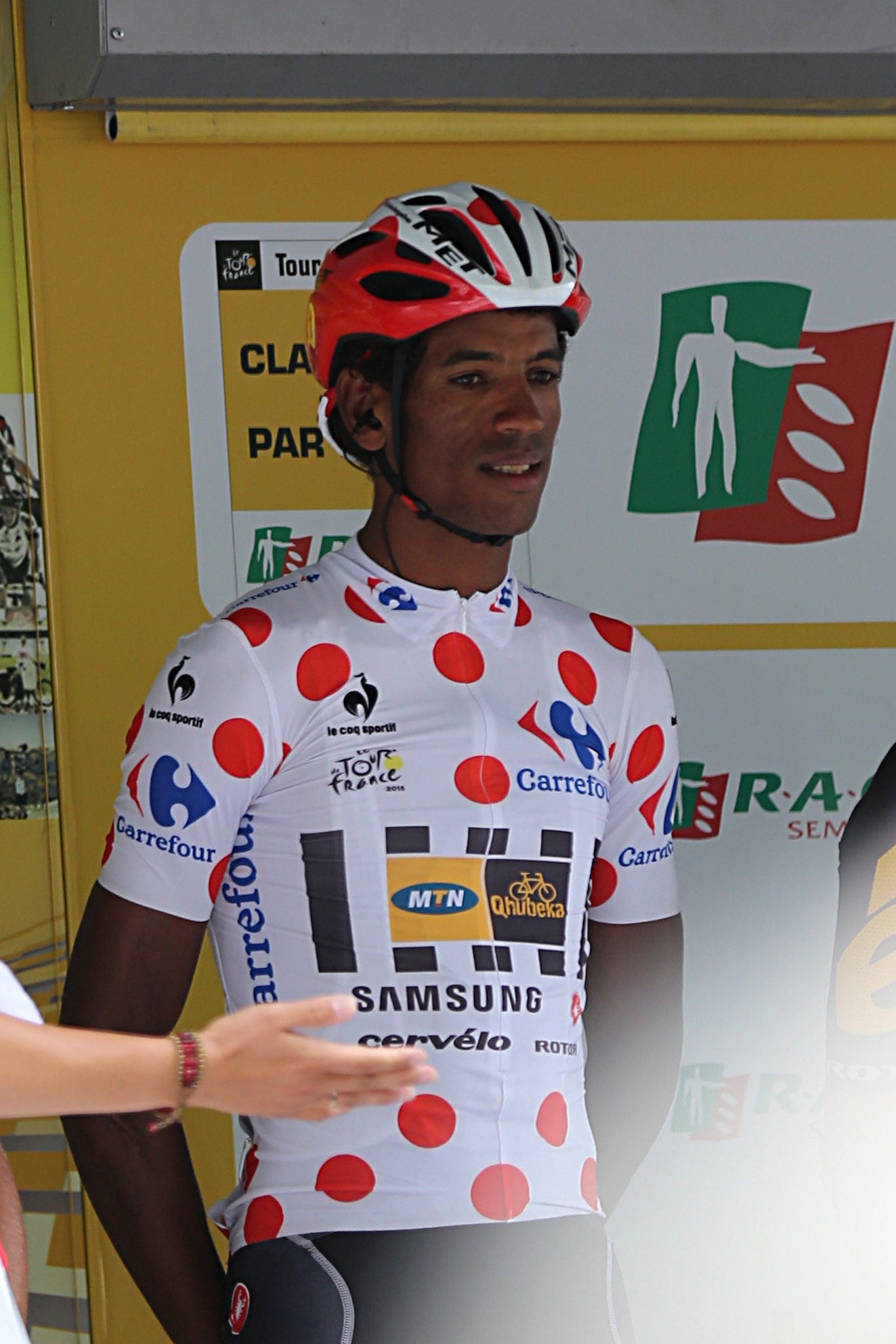 Daniel Teklehaimanot lors du départ de la 8e étape du Tour de France 2015 à Rennes.